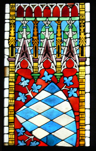 München, Bayerisches Nationalmuseum: Eine von zehn Glasscheiben aus Kloster Seligenthal bei Landshut, 1. Viertel 14. Jahrhundert, Inv. Nr. G. 914-923, erworben 1860. Wappenscheibe